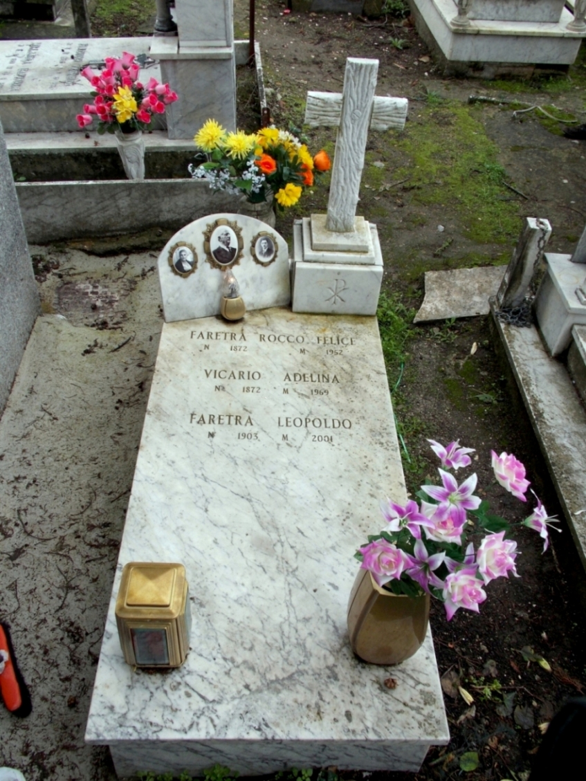 Leopoldo Faretra tomba